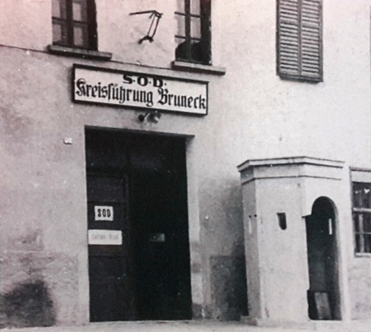 Comando circondariale del SOD - Kreisleitung des SOD - Brunico